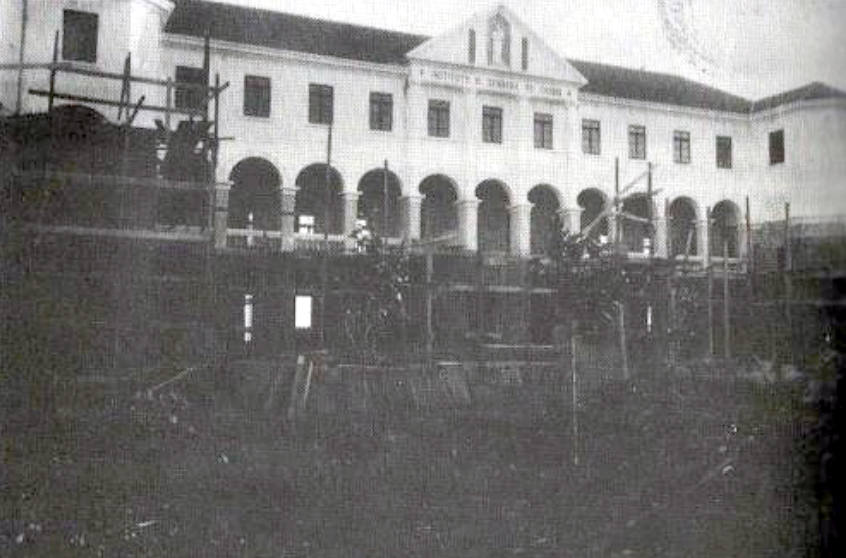 Colégio do Carmo em construção, Caxias do Sul.